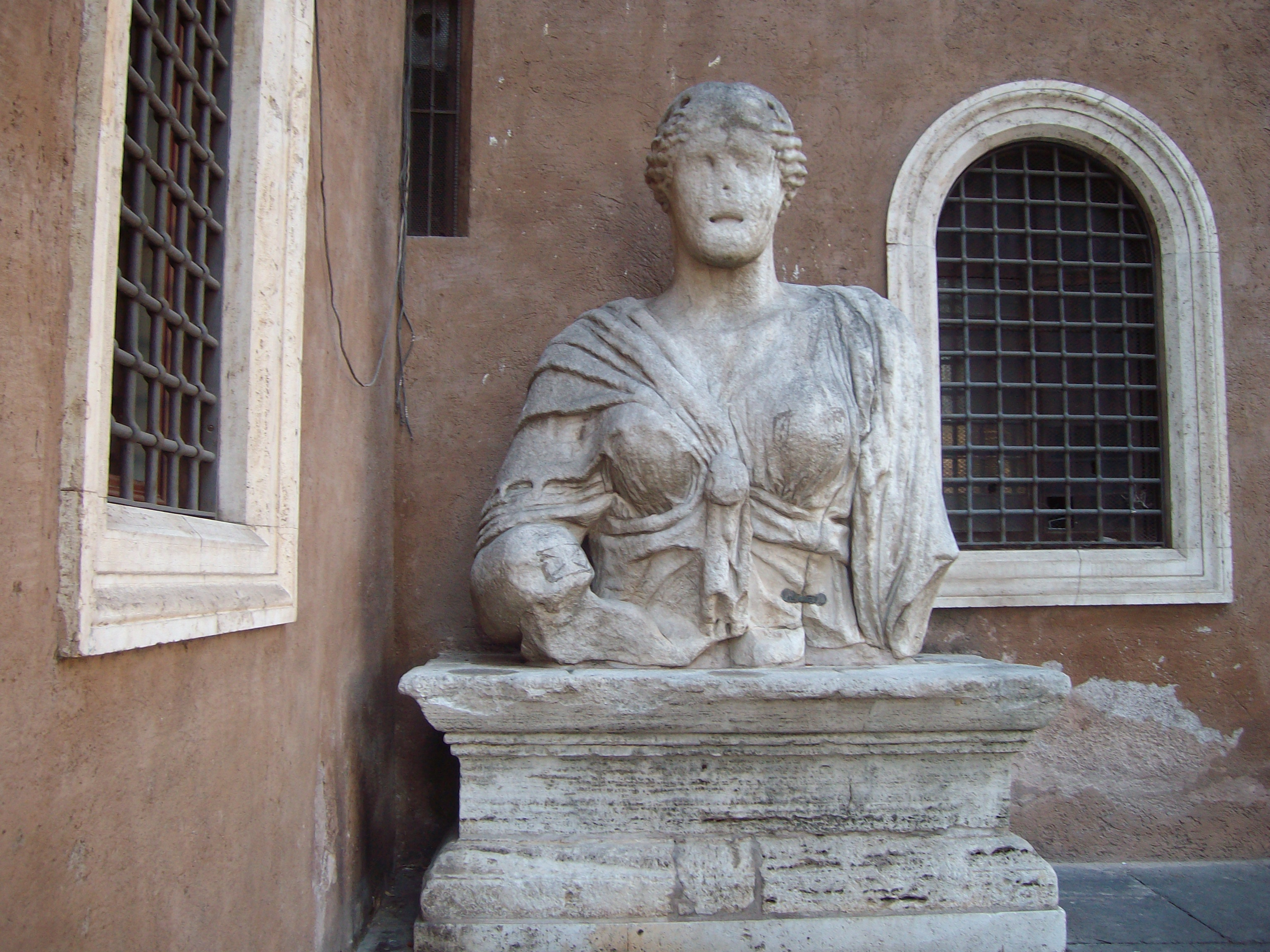 Vista frontale della statua